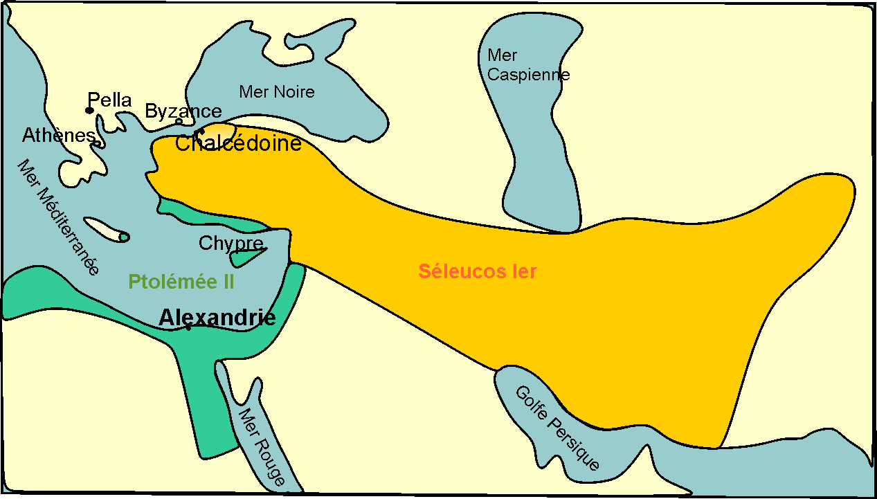 Monde hellénistique en -281 Chalcédoine